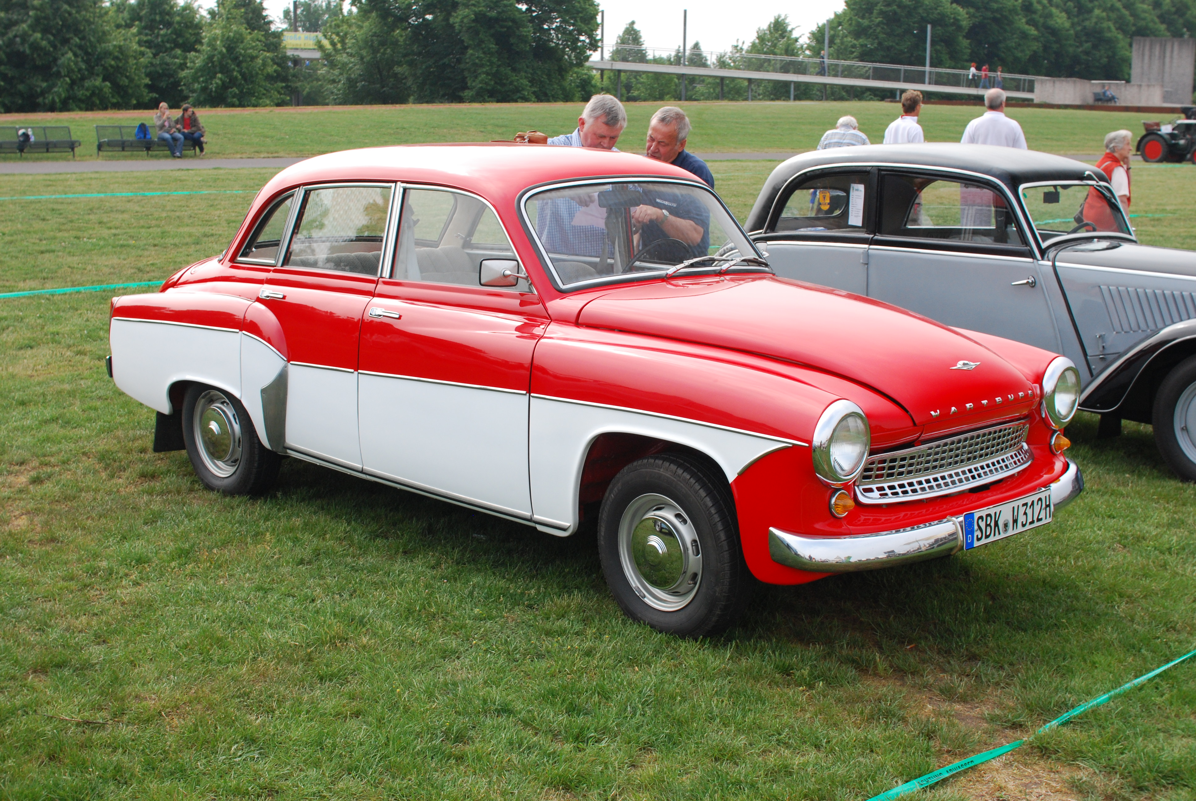 1. Magdeburger Oldtimertag am 21.05.2011 im Elbauenpark Magdeburg